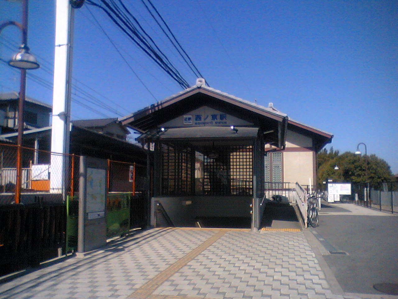 西ノ京駅。2007/3/1 ちょろ により撮影